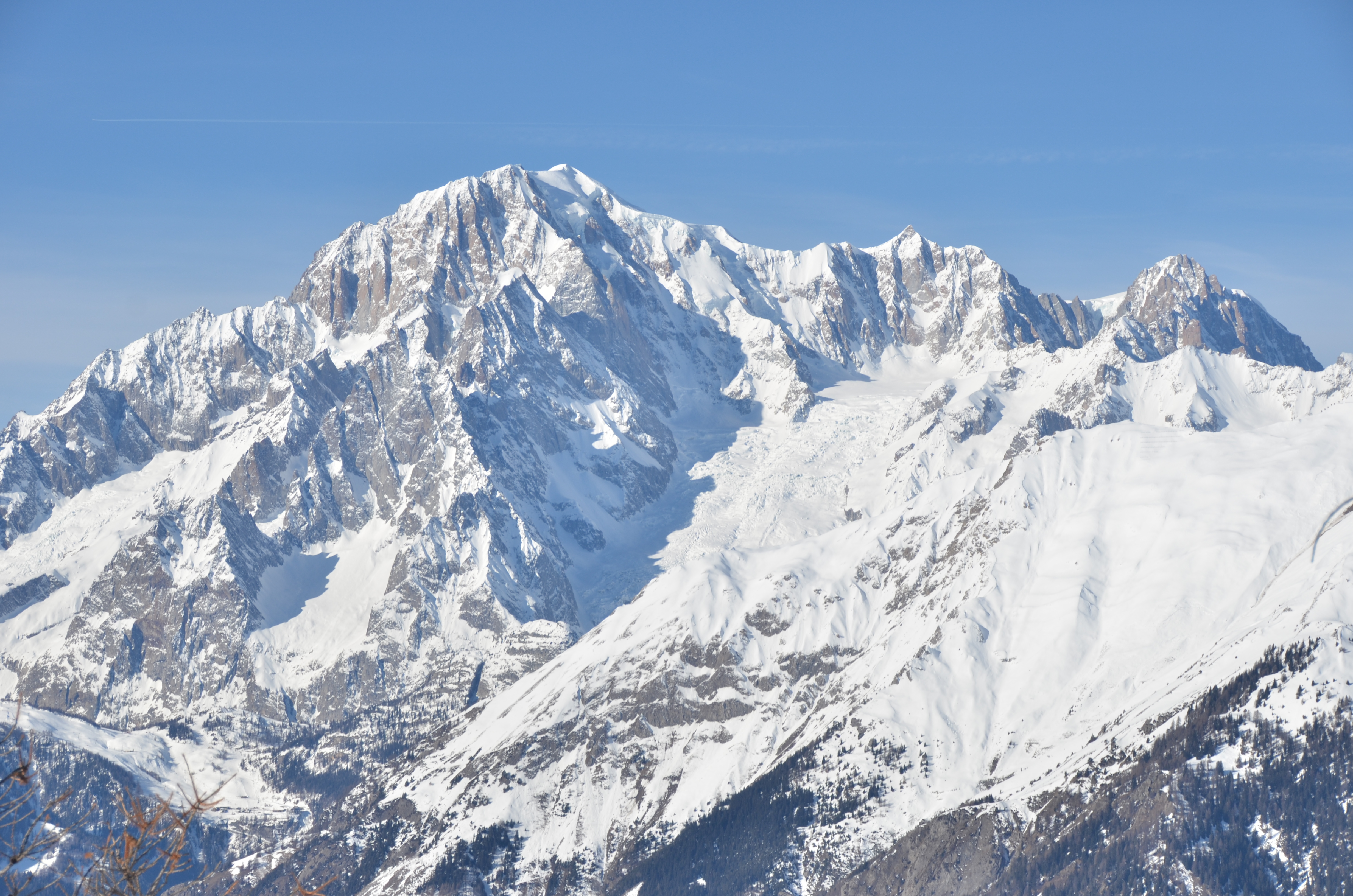 Monte Bianco This is a photo of a monument which is part of cultural heritage of Italy.